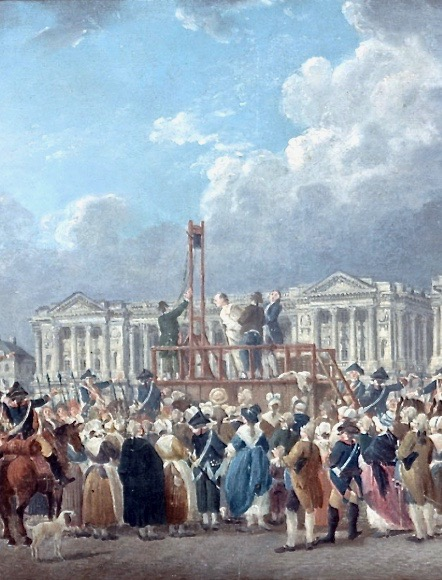 Pierre-Antoine Demachy (1723 - 1807); Une exécution capitale, place de la Révolution (Place de la Concorde), vers 1793, détail. Huile sur papier marouflé sur toile, 37 x 53,5 cm. Musée Carnavalet - Histoire de Paris. Célèbre pour ses vues de Paris, Demachy illustre aussi l’actualité. Les façades de Gabriel plantent le décor. La guillotine tient le premier rôle. Toutefois, l’artiste n’a pas fixé l’instant décisif. Le condamné est peint du même pinceau « impressionniste » que la foule sagement massée au pied de l’échafaud. Demachy réagit d’abord en coloriste : rose fuchsia d’une jupe, blanc éclatant d’un bonnet pour éclairer la gamme un peu sourde des costumes, et bleu pour illuminer les gris-mauve des nuages.